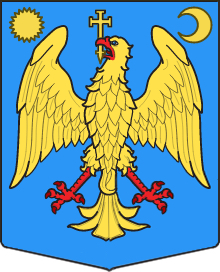 Stema Ţării Româneşti aşa cum apare pe stema României interbelice (şi pe altele anterioare sau posterioare)